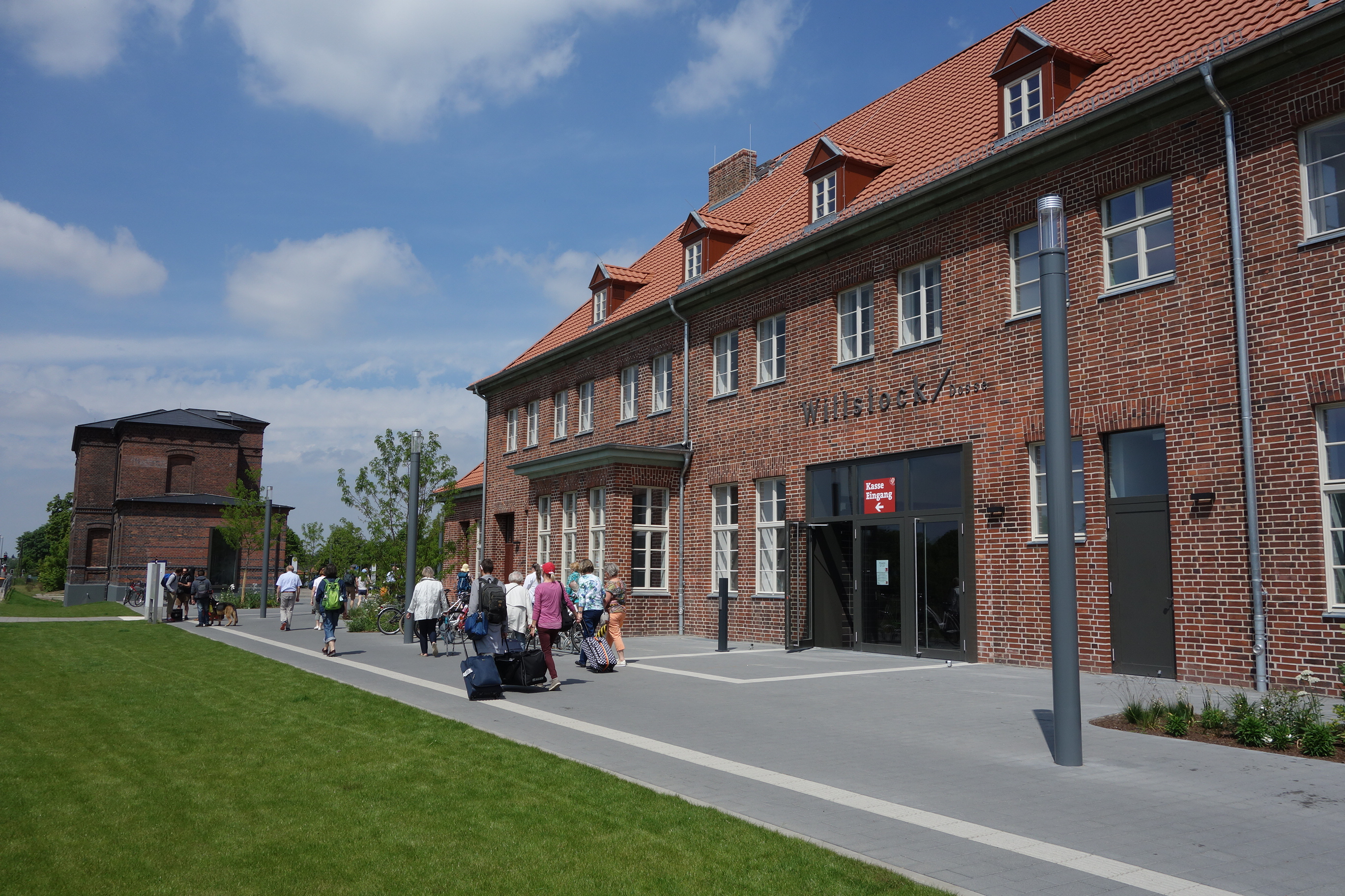 Bahnhof Wittstock (Dosse), Empfangsgebäude